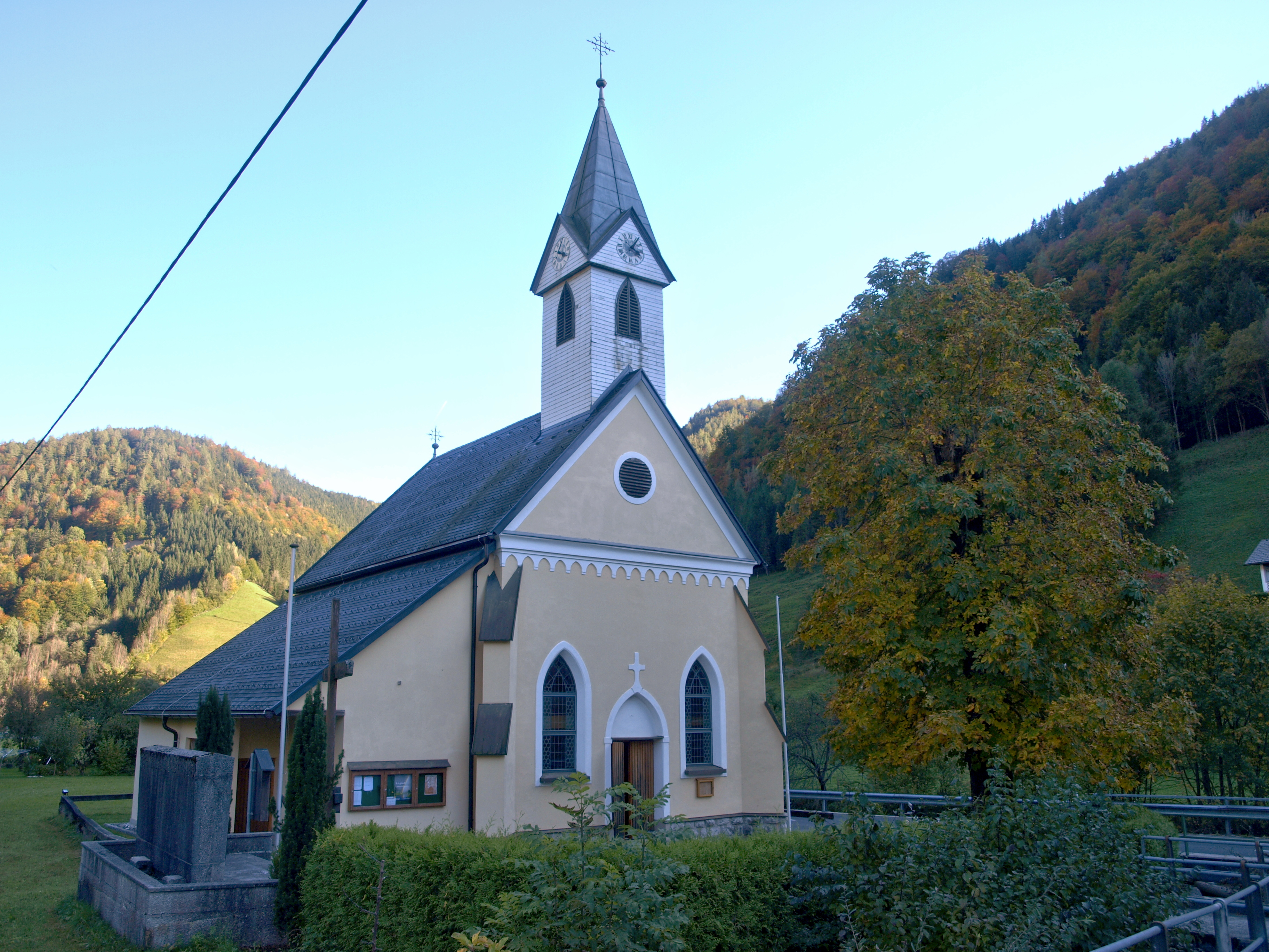 Kirche